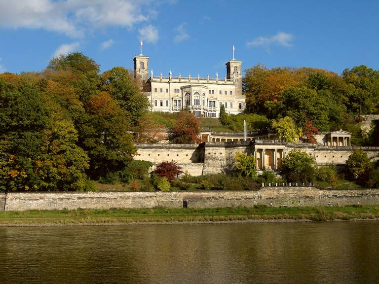 Dresden Loschwitz - Schloss Albrechtsberg